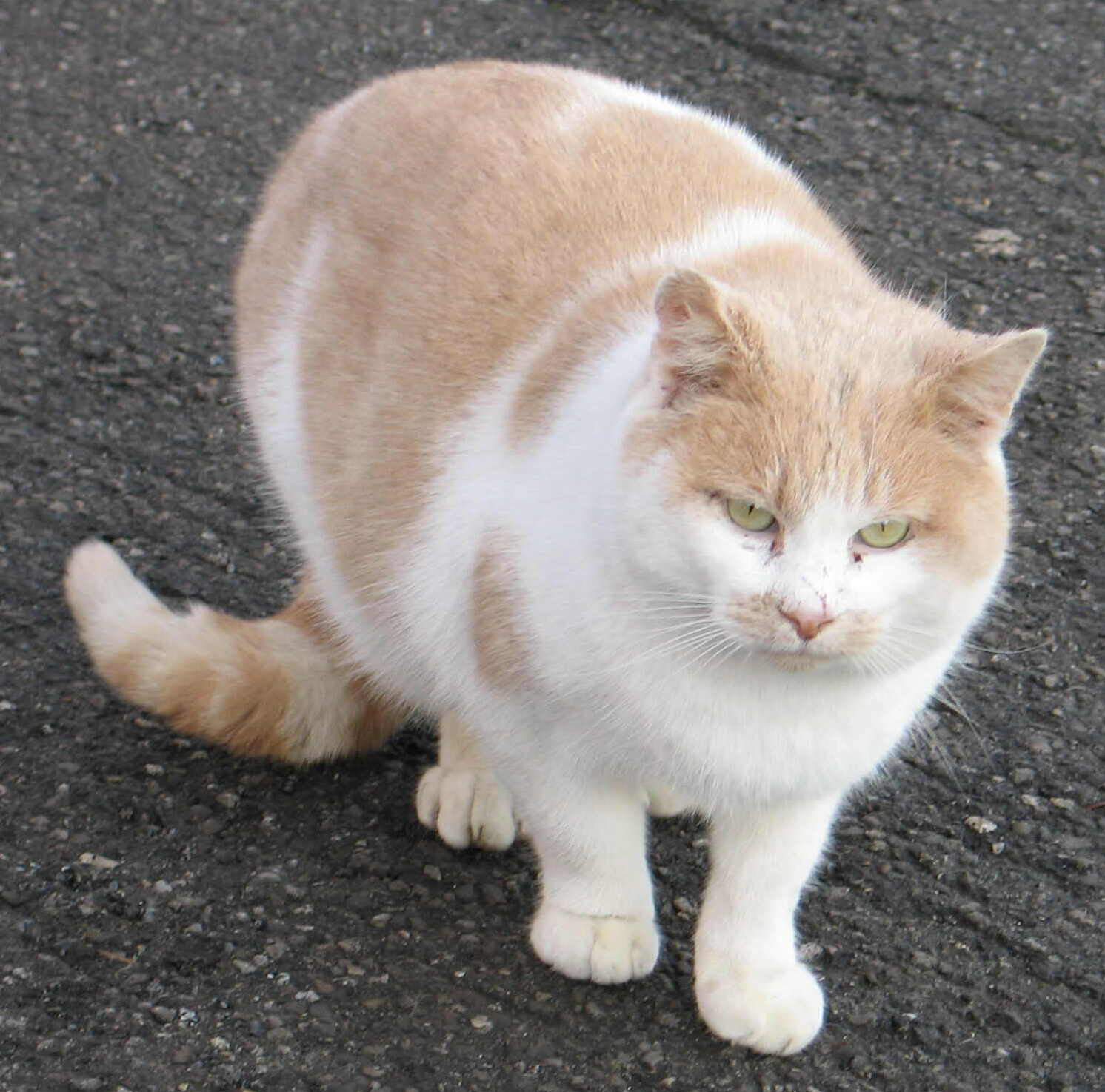 Hauskaz